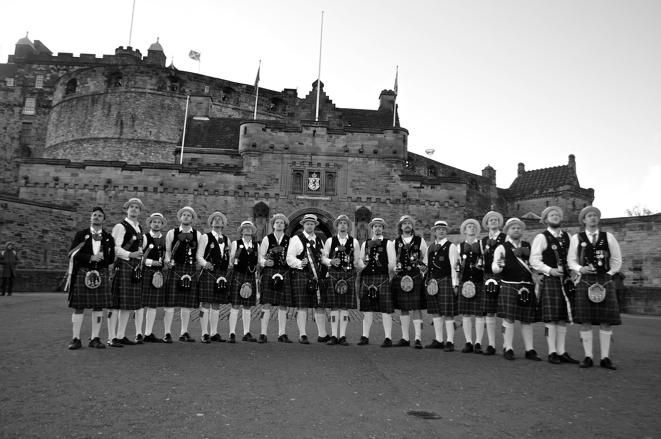 Svæveru’-Koret I Skottland